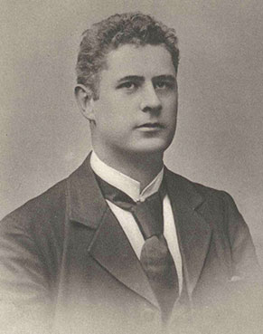 Hjalmar Selander (1859-1928)